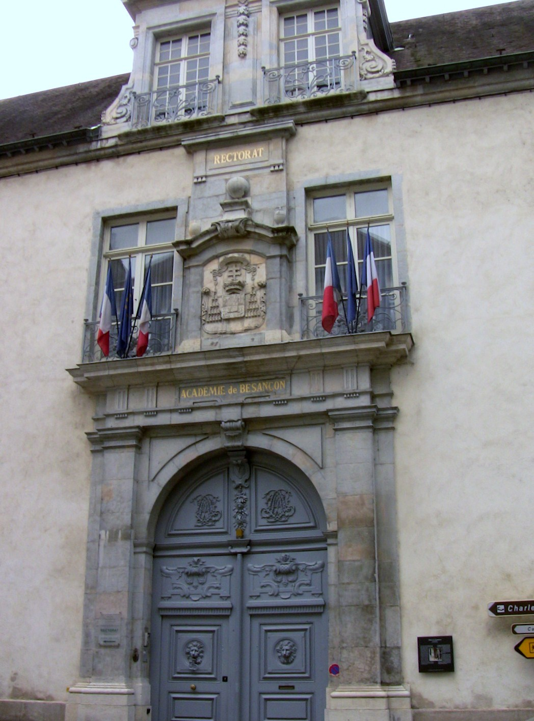 Le rectorat de Besançon (Doubs, France). Les armes présentes au dessus de la porte sont celles du cardinal Louis François Auguste de Rohan-Chabot (1788-1833).